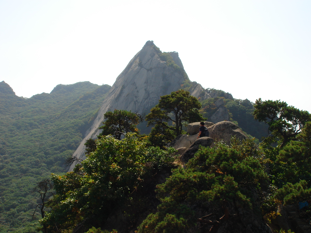 Phoenix mountain (Feng Huang Shan)